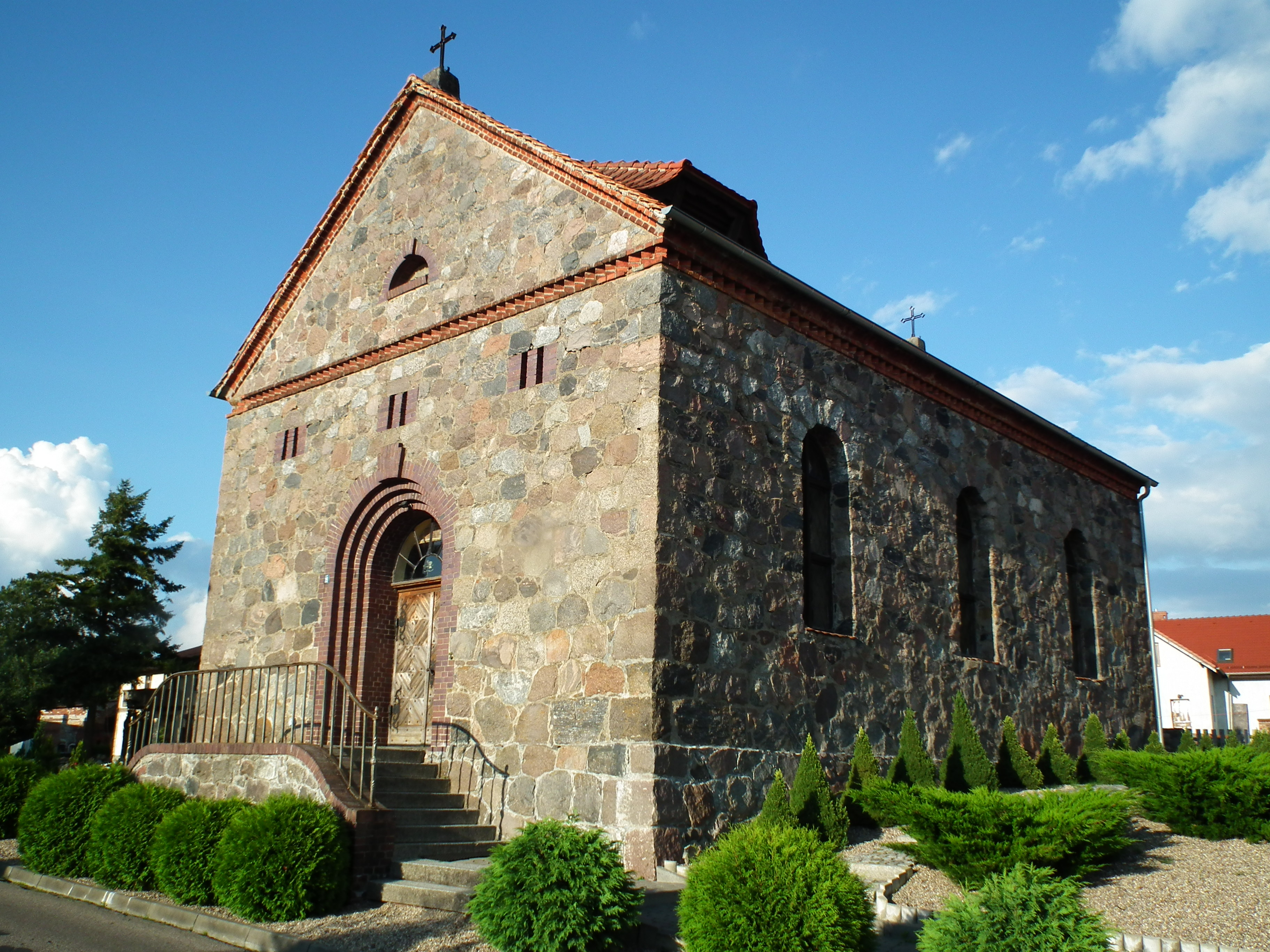 Sikory - rzymskokatolicki kościół parafialny p.w. św. Stanisława, 1869.